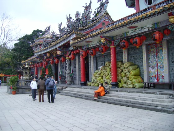 臺北市士林區芝山岩惠濟宮。